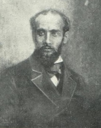 Retrato del periodista Manuel Milá de la Roca